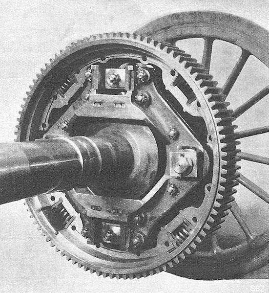 SLM-Universalantrieb: Blick in das Innere der Kreuzkupplung